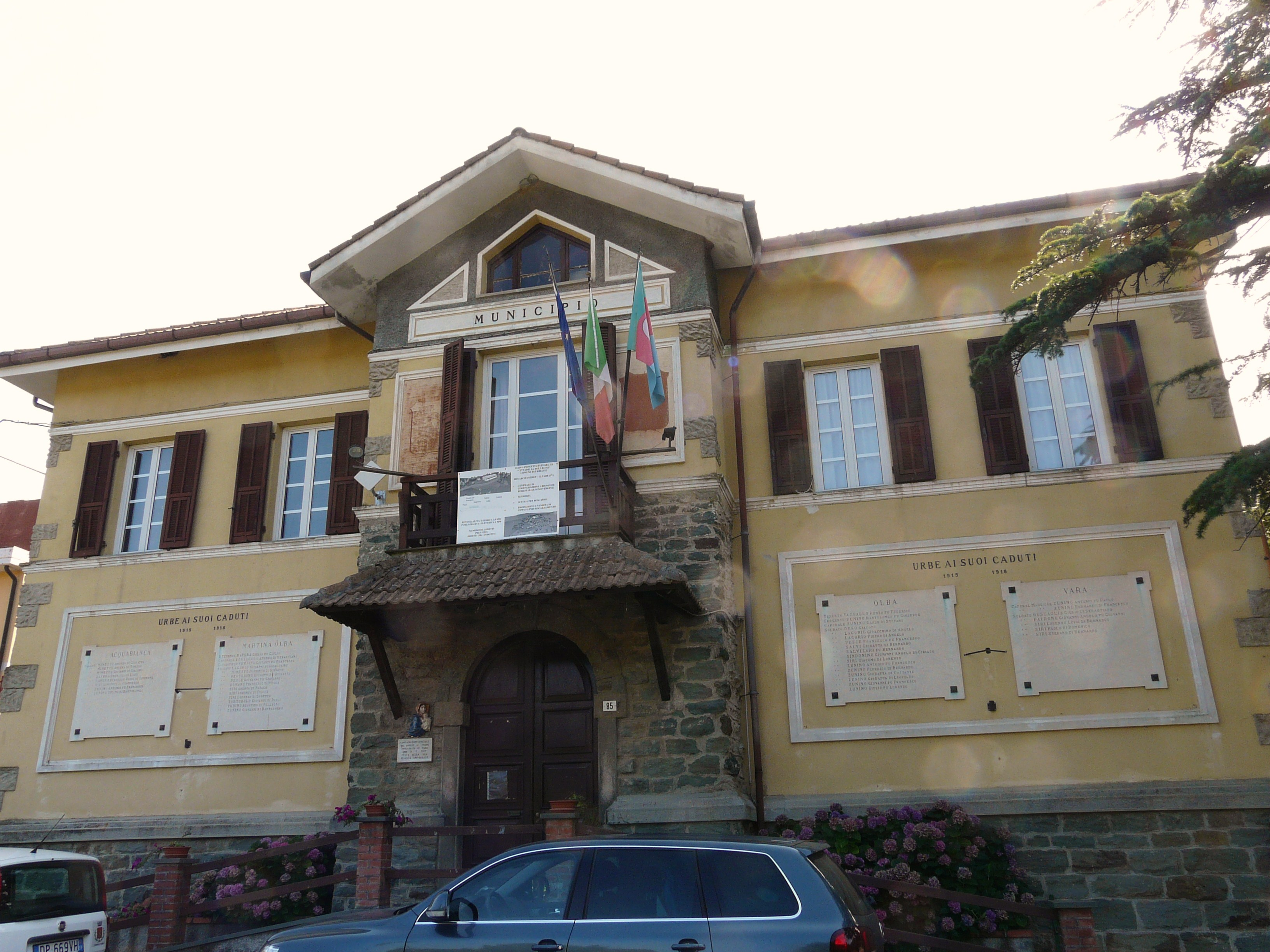 Municipio presso Martina d'Olba del comune di Urbe, Liguria, Italia